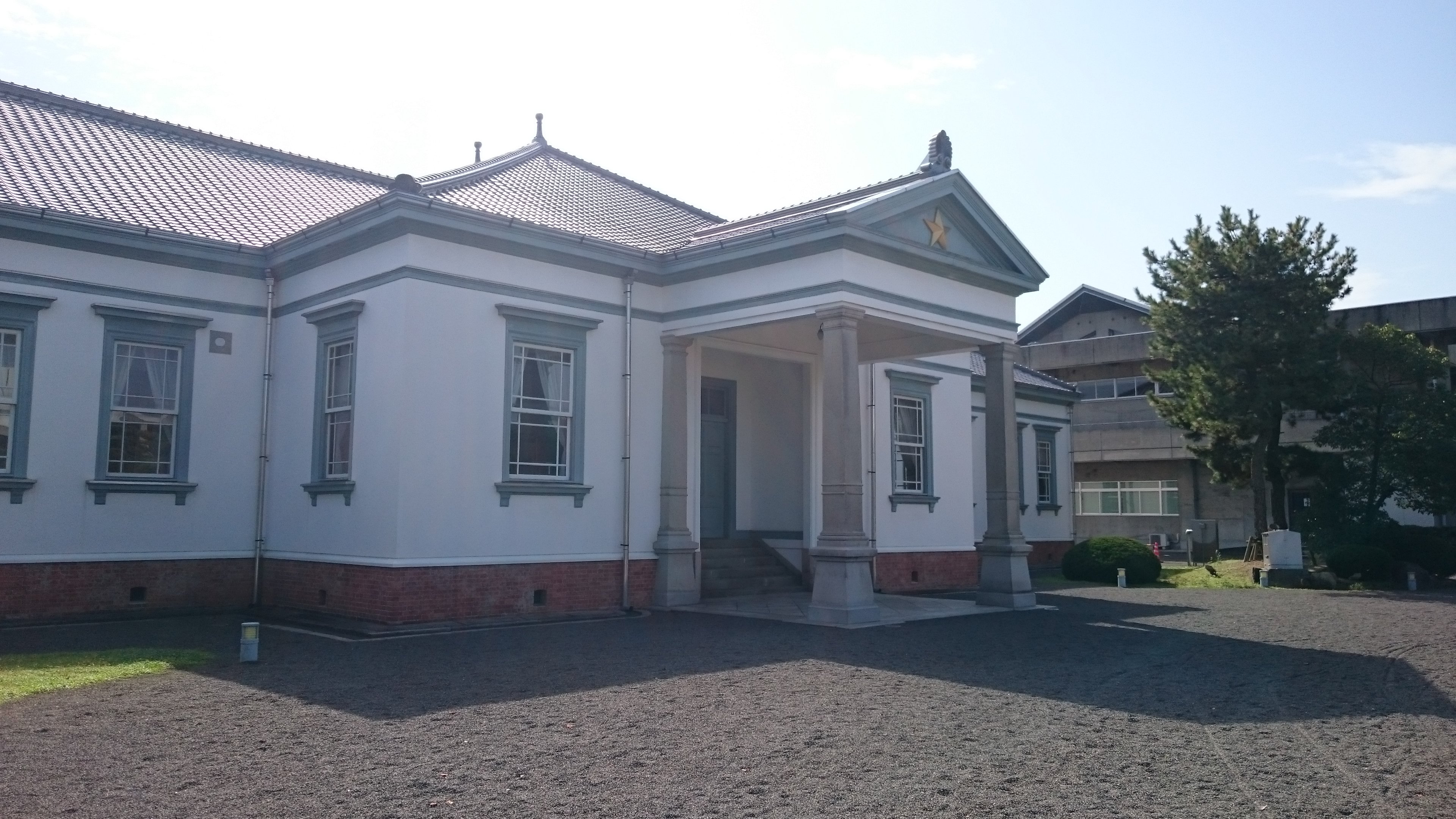 旧善通寺偕行社の旧玄関側